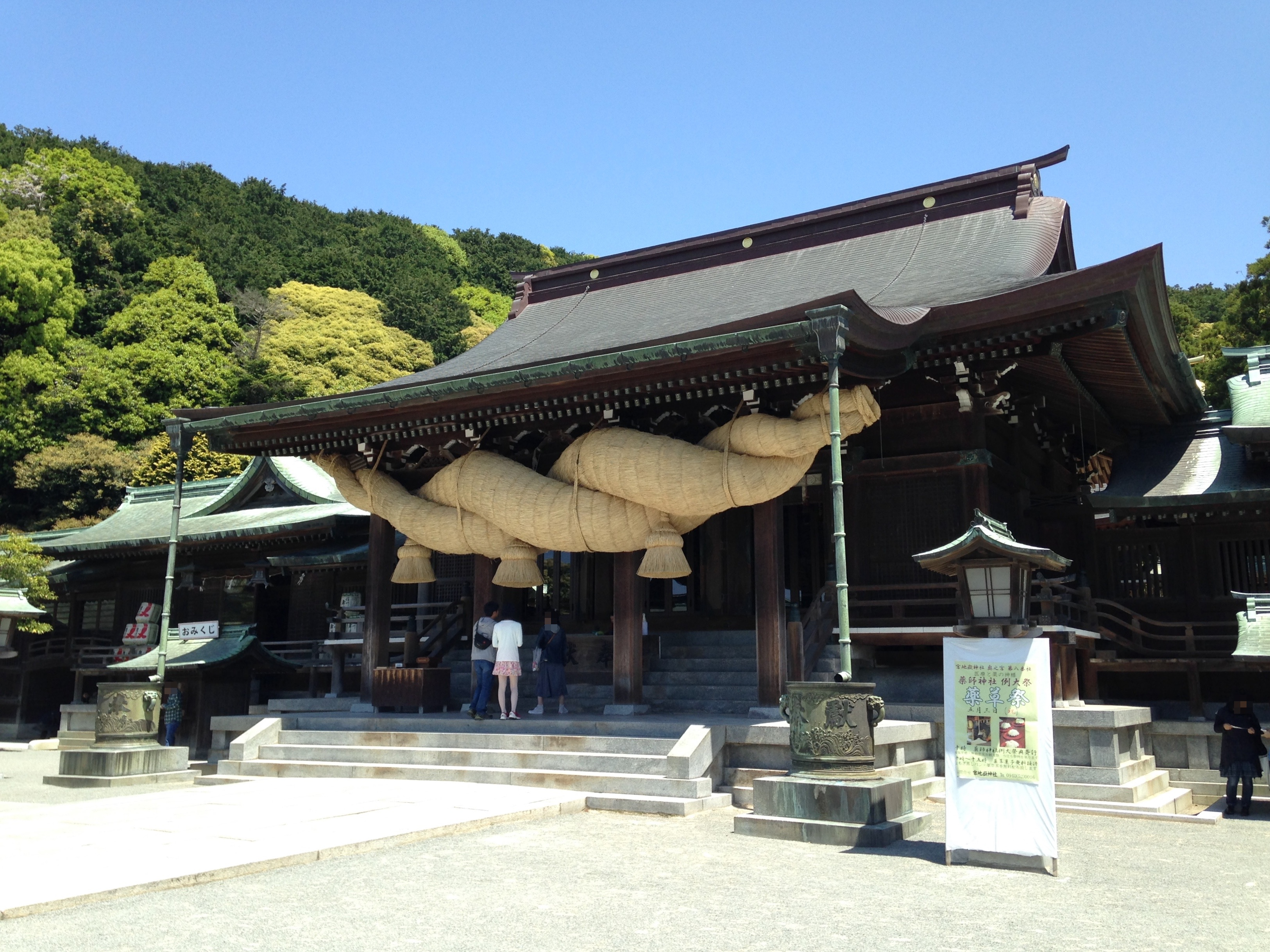 宮地嶽神社・拝殿